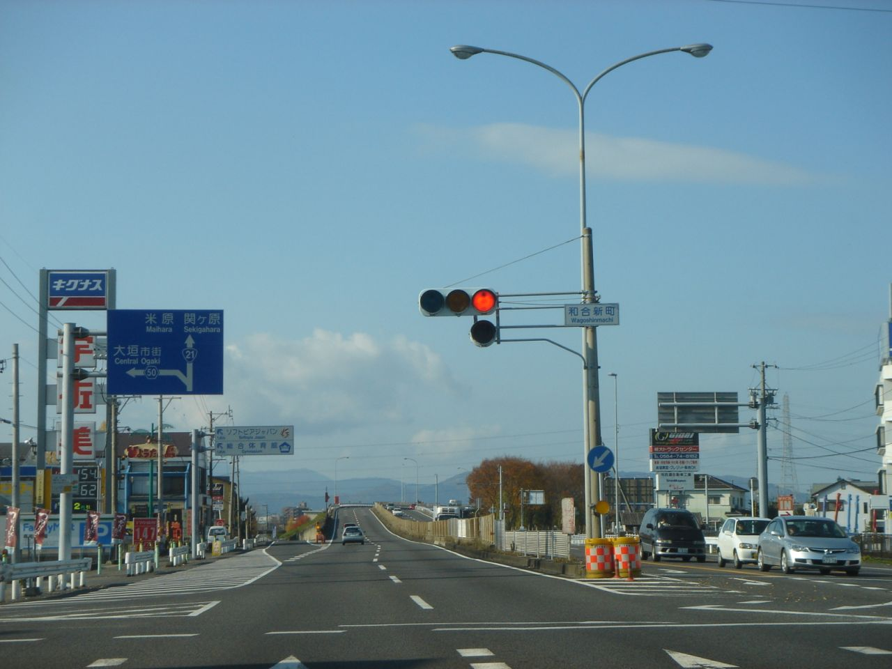 Japanese National Route21 at Ogaki_Wago.（国道21号）,Ogaki,Gifu,Japan(岐阜県大垣市)で西側を撮影。先が和合インター。